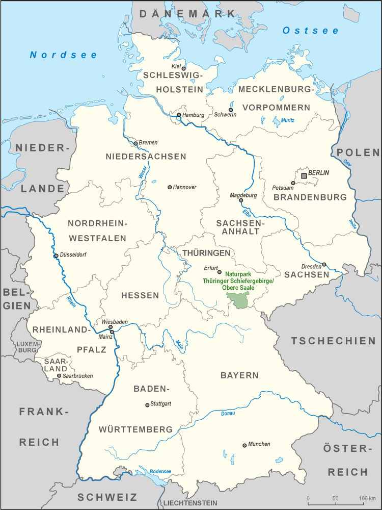 Karte des Naturparks Thüringer Schiefergebirge/Obere Saale in Deutschland